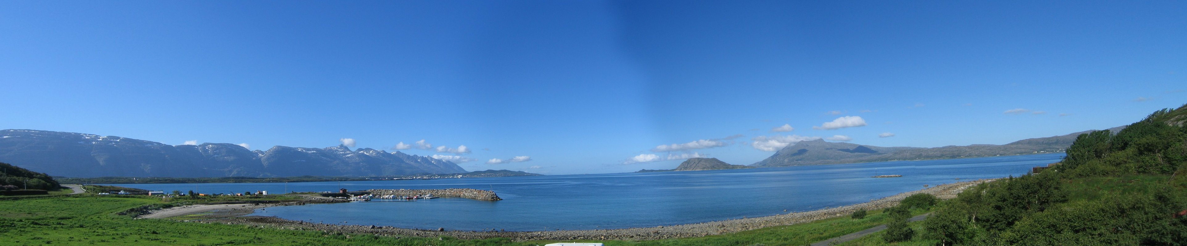 Panorama towards the south from Angersneset in Leirfjord. Sandnessjøen, De Syv Søstre, and Dønna.